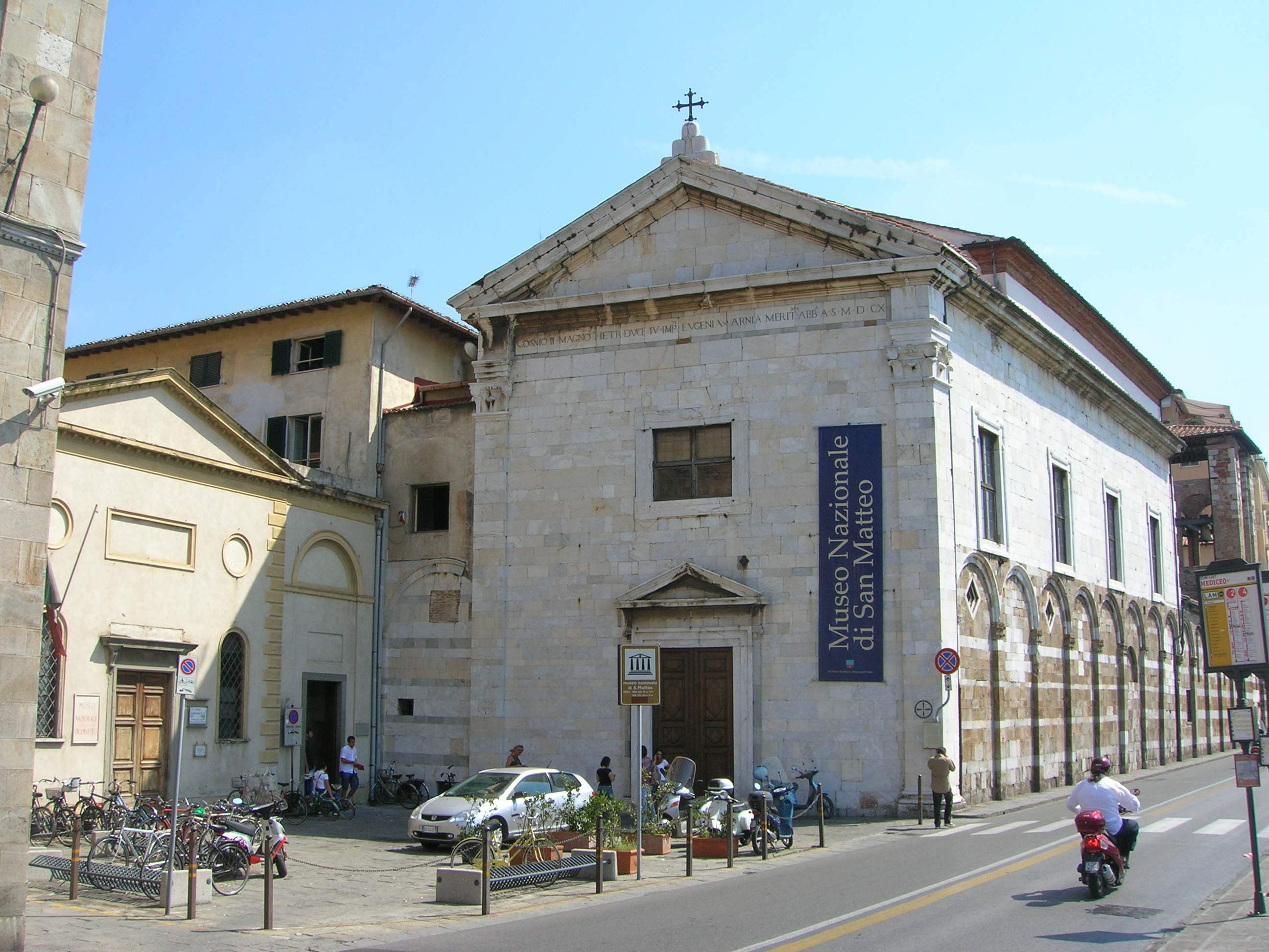 Museo di San Matteo di Pisa - Esterno